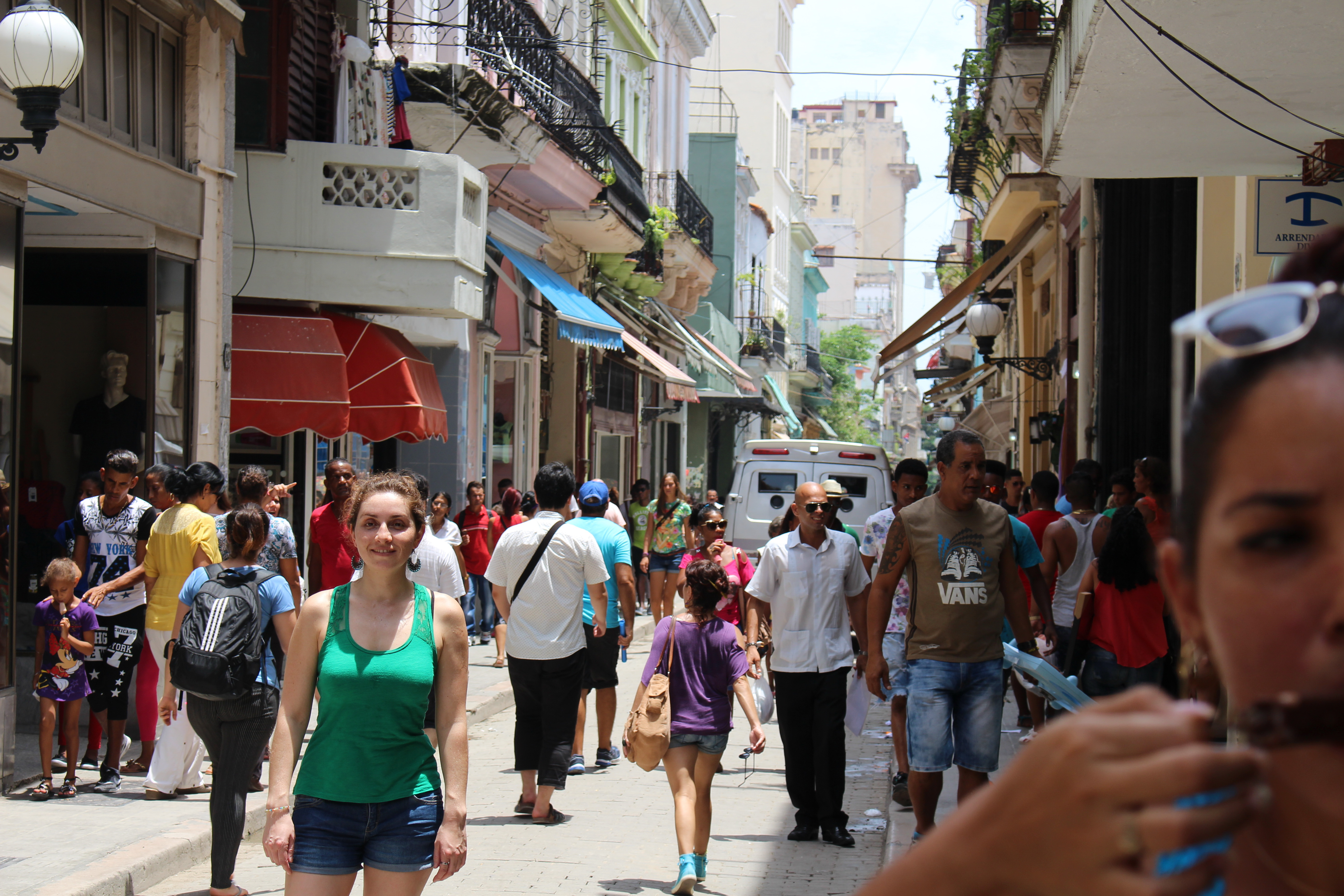 Ubicada al sur de la Plaza de Armas y a un costado del Palacio de los Capitanes Generales, corre desde las riberas de la bahía hasta la calle de Monserrate. Es atravesada por las calles Baratillo, Oficios, Mercaderes, San Ignacio, Cuba, Aguiar, Habana, Compostela, Aguacate, Villegas y Bernaza. Es la calle mas transitada y mas turistica del casco histórico de La Habana.